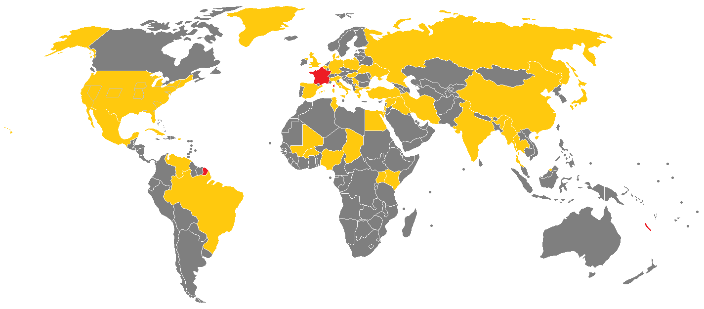 Pays visités par le reporter Martin Weill pour l'émission télévisée Le Petit Journal.